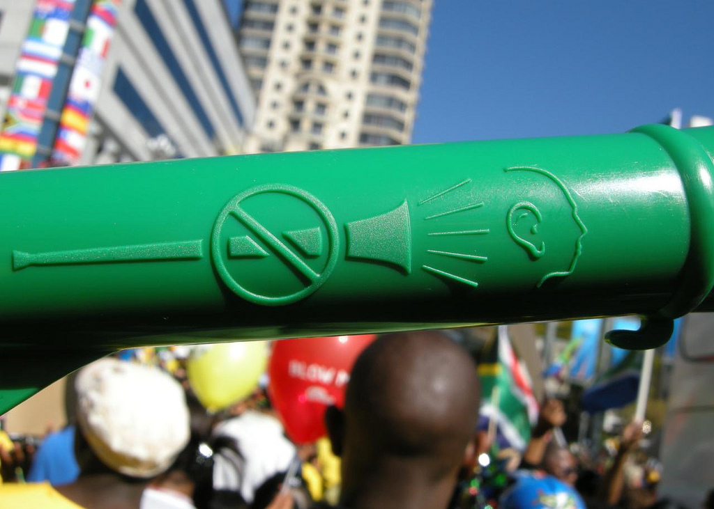 Vuvuzela Day